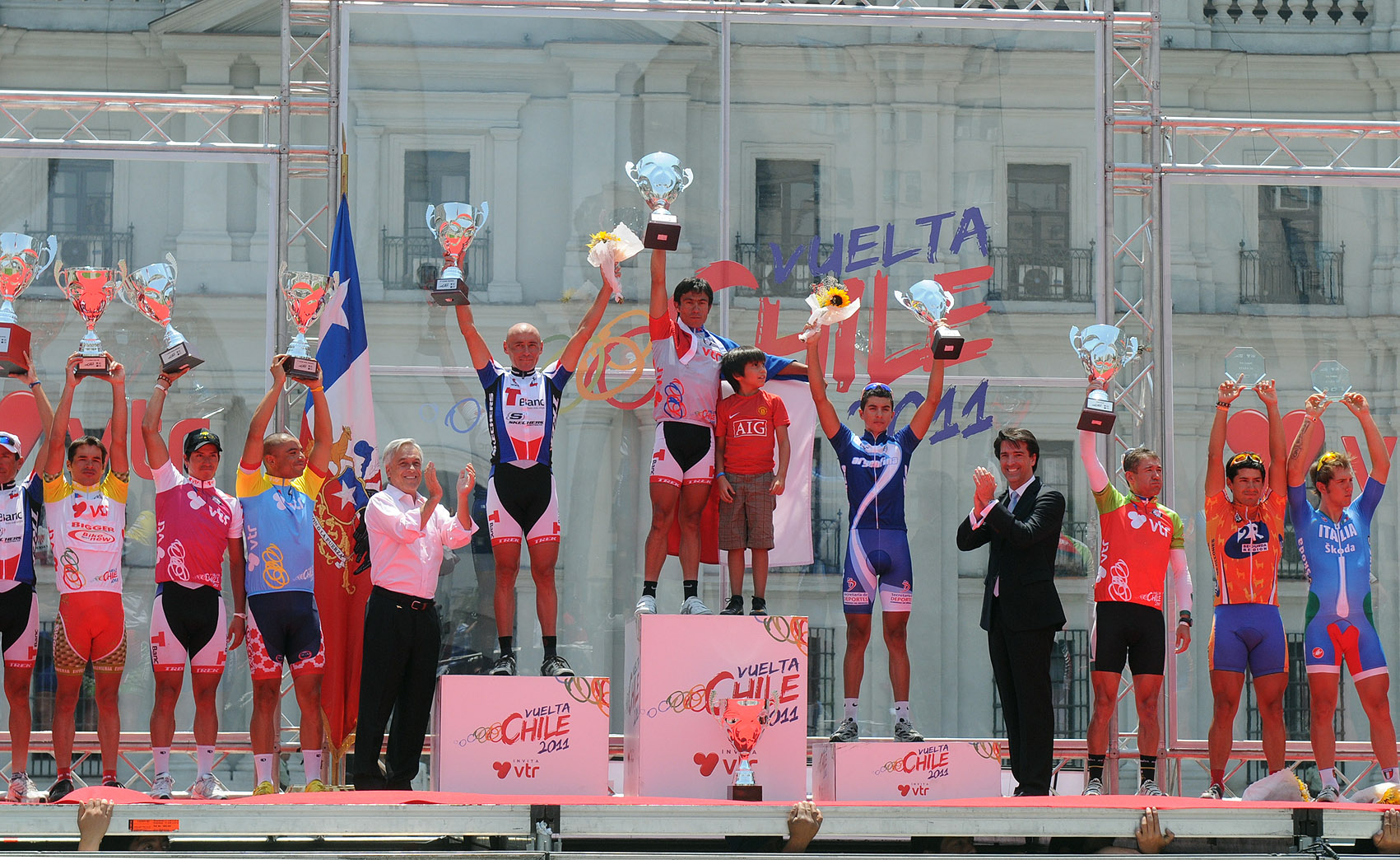 06-02-2011 Etapa final Vuelta Ciclística de Chile